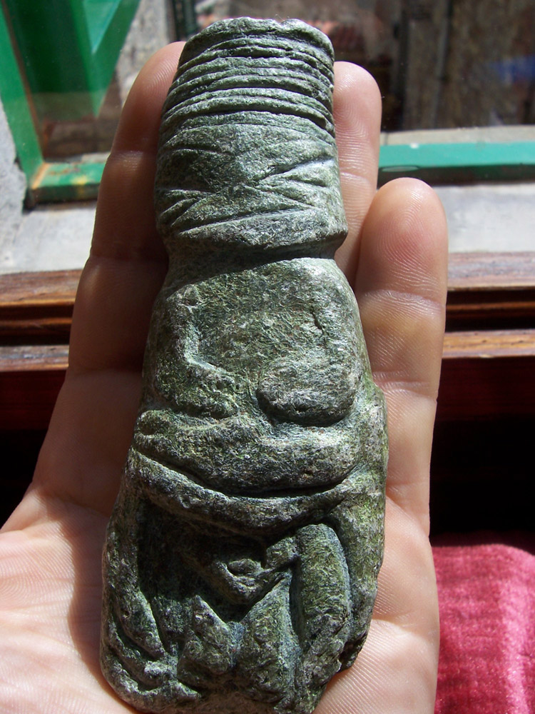 Luca Filippetti